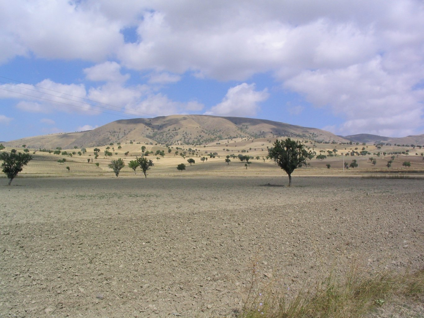 Landschaft westlich von Ankara, Türkei